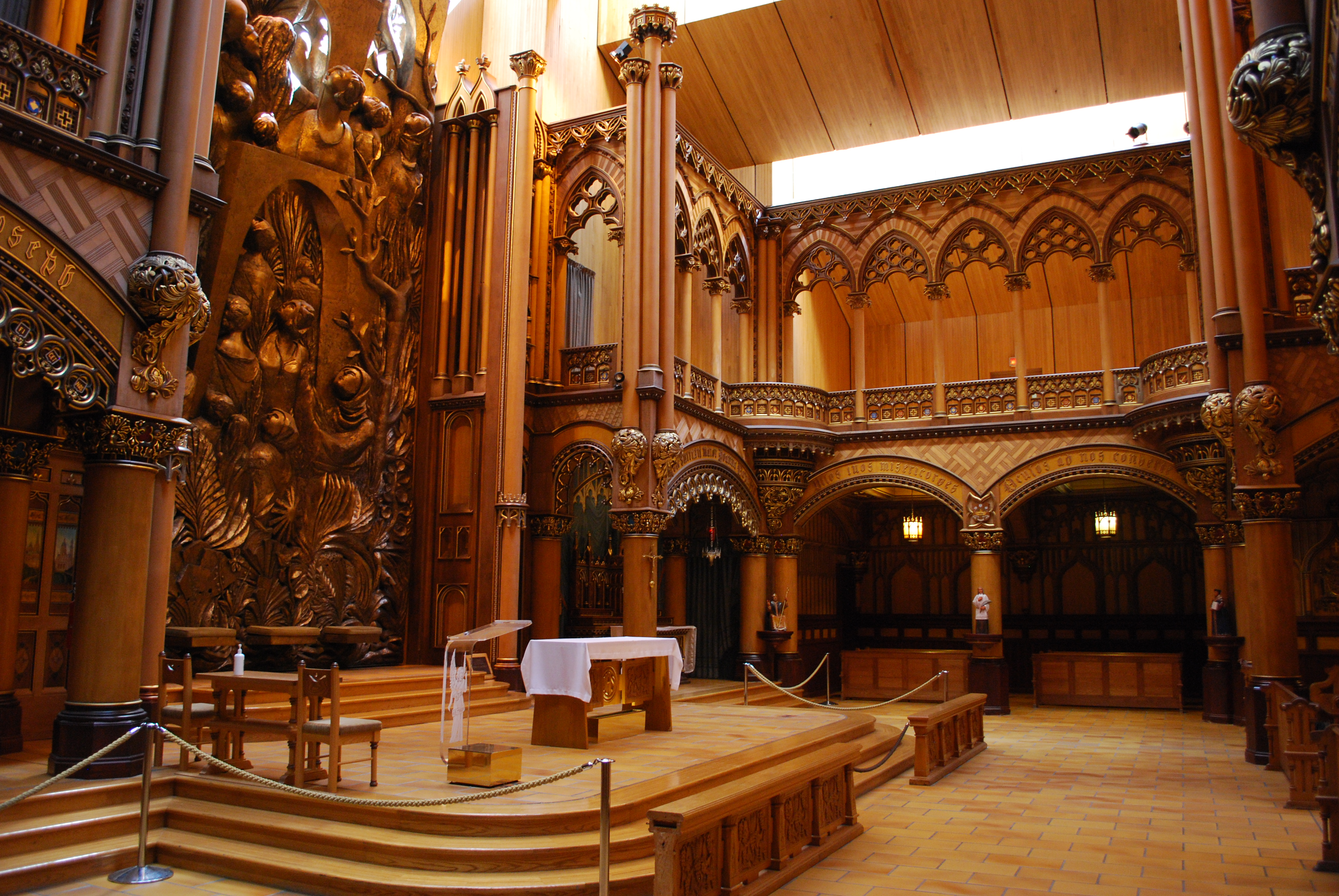 Transept sud de la chapelle Notre-Dame du Sacré-Coeur, dans la basilique Notre-Dame de Montréal.